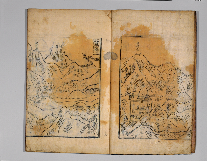 서울특별시 유형문화재 제301호 북한지 (北漢誌)